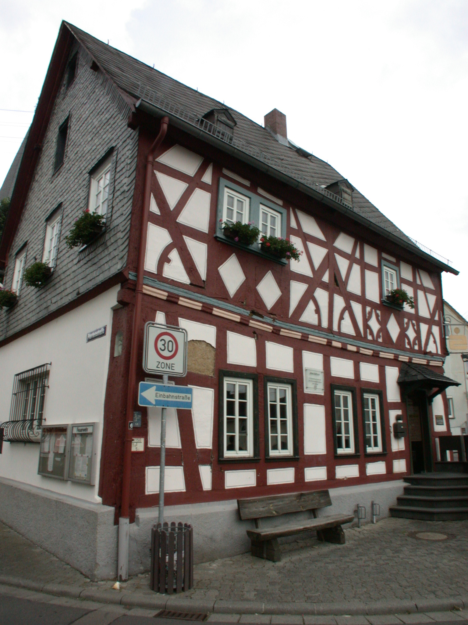 Ehemaliges Rathaus in Hadamar-Niederhadamar